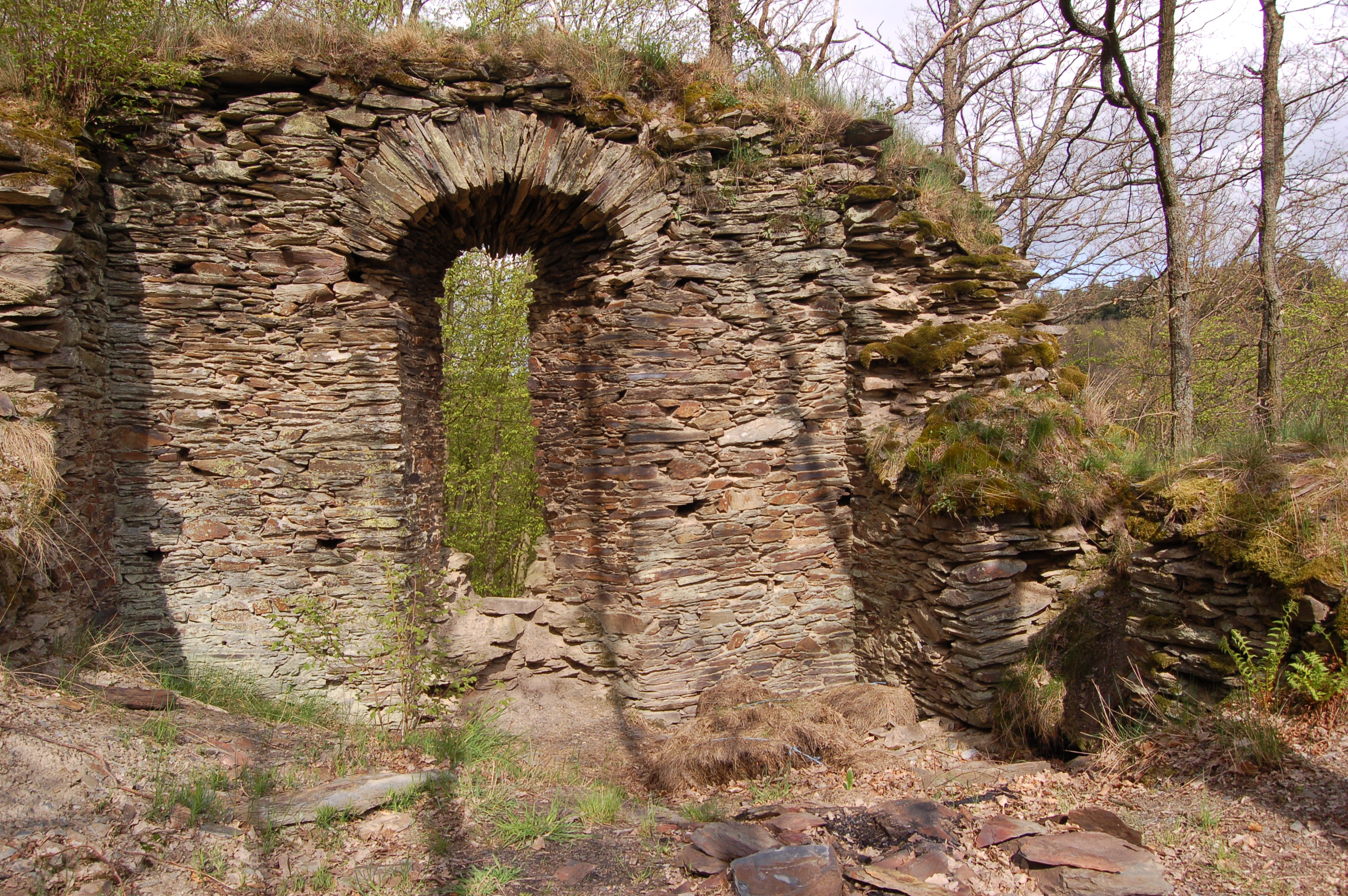 Woppenroth Hellkirch innen